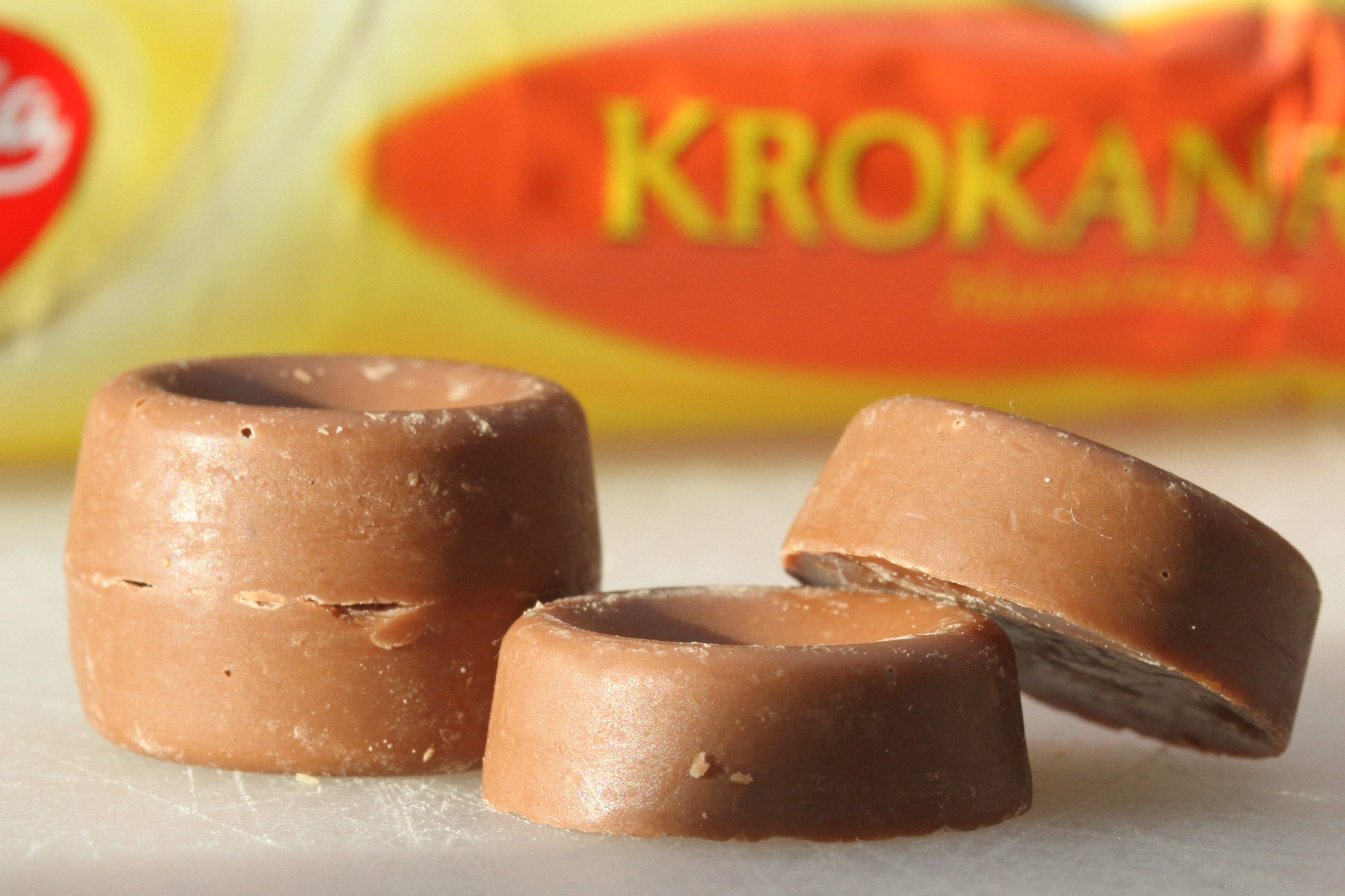 Sjokoladen Krokanrull.